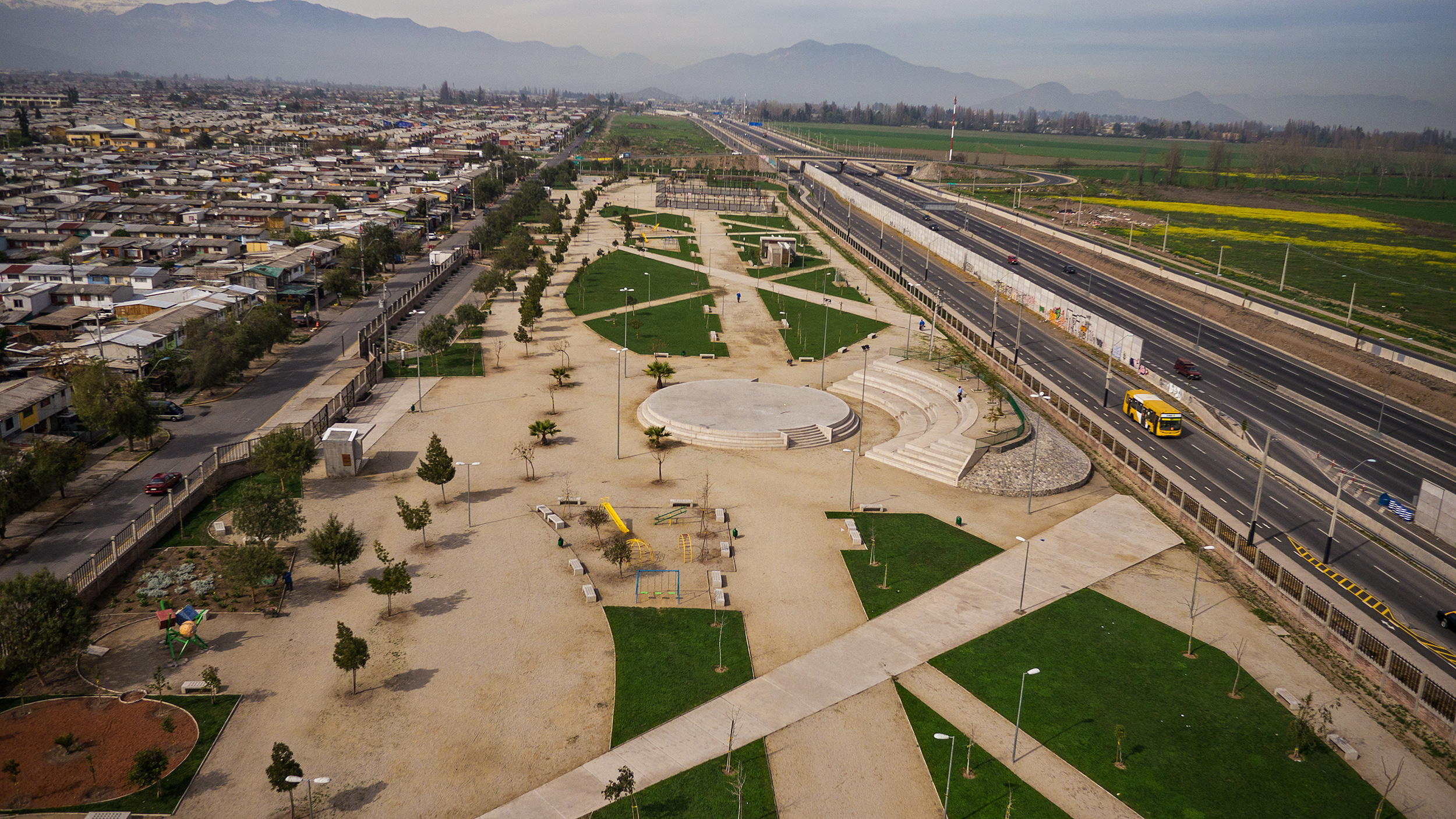 Parque La Platina, La Pintana, Chile. A la derecha, el acceso sur a Santiago.